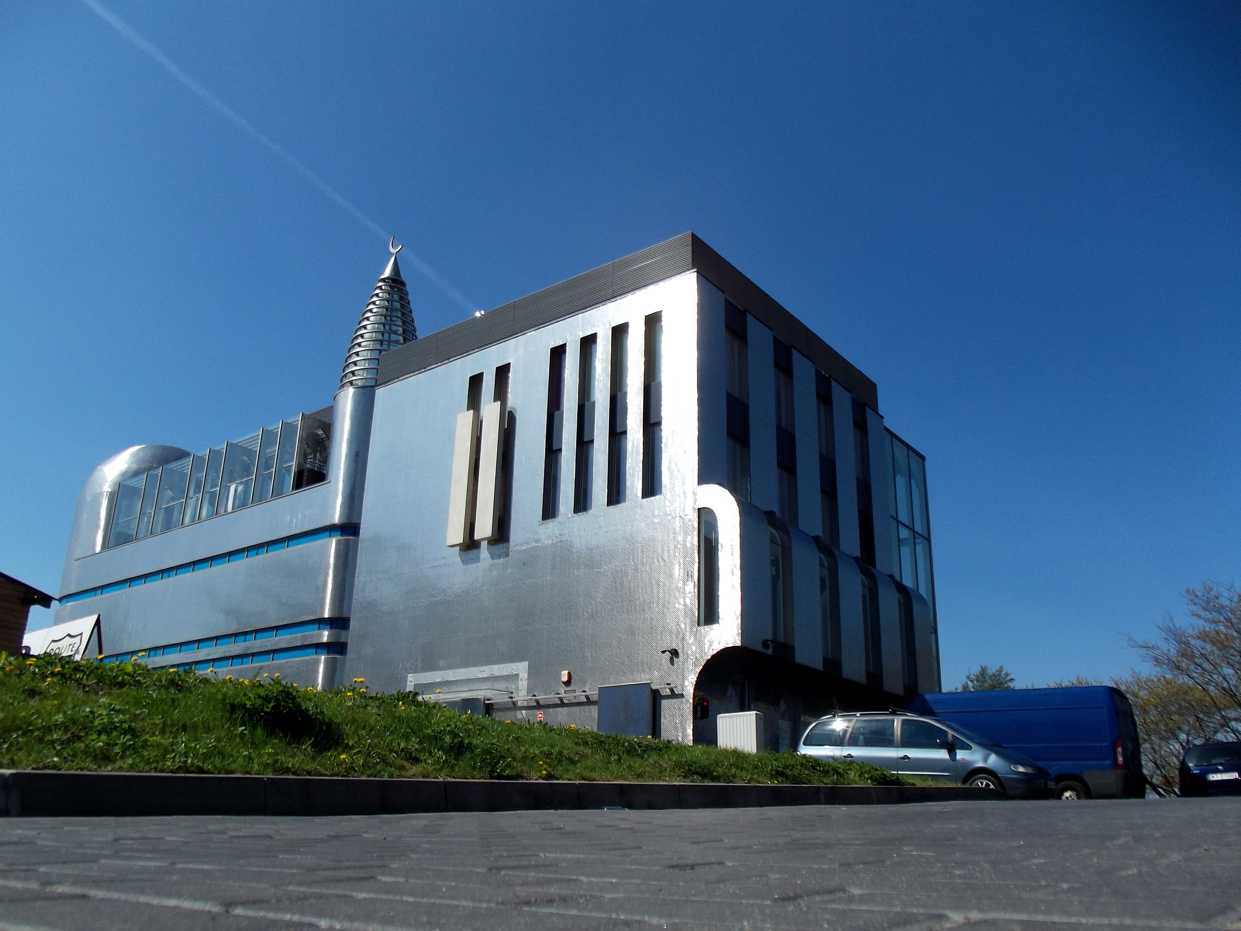 Nowy Ośrodek Kultury Muzułmańskiej i siedziba przyszłej Ligi Muzułmańskiej w RP (stan kwiecień 2015 r.)